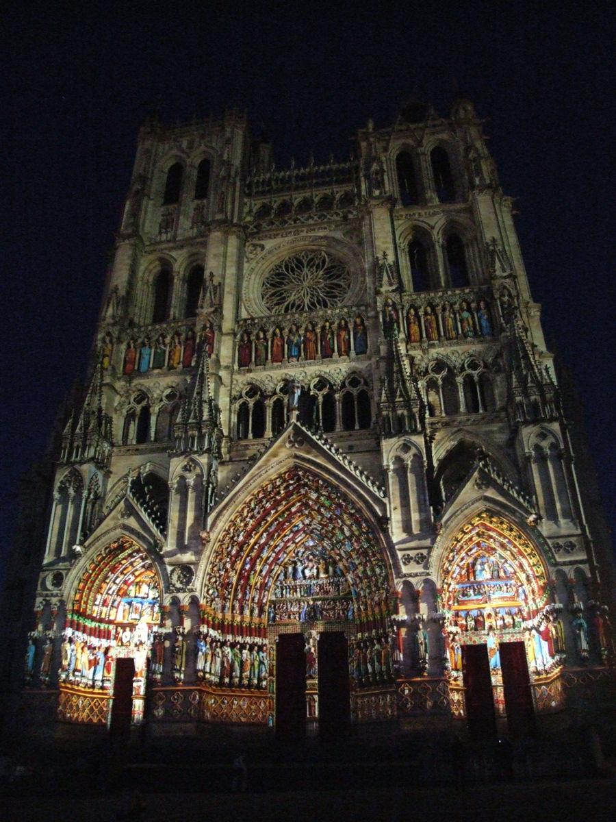 Amiens Cathedral (Cathédrale Notre-Dame d'Amiens), France - Son et lumière July 2007